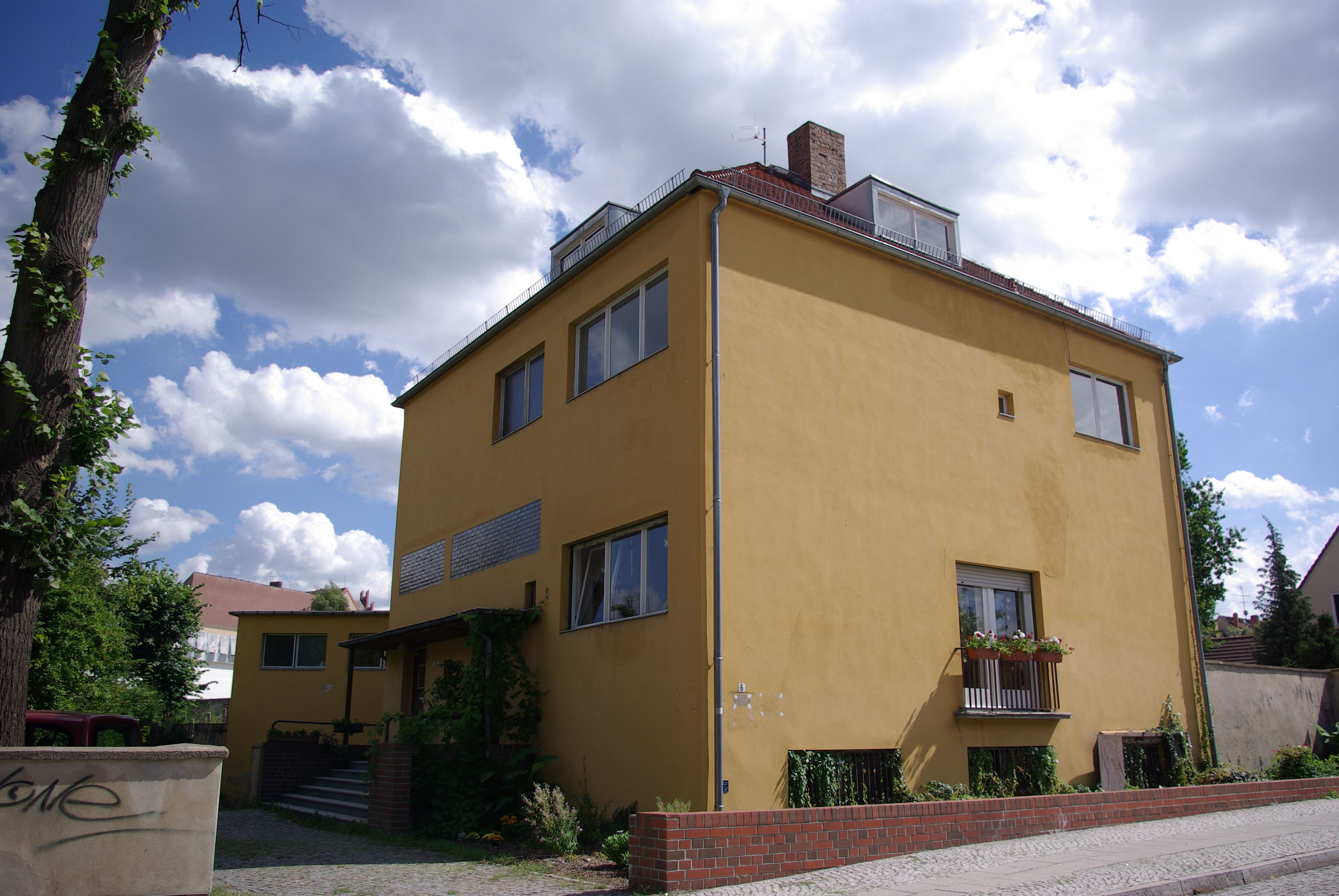 Jüterbog in Brandenburg. Das Haus für Dr. Estrich wurde 1929 bis 1930 von Konrad Wachsmann erbaut. Das Haus steht unter Denkmalschutz.